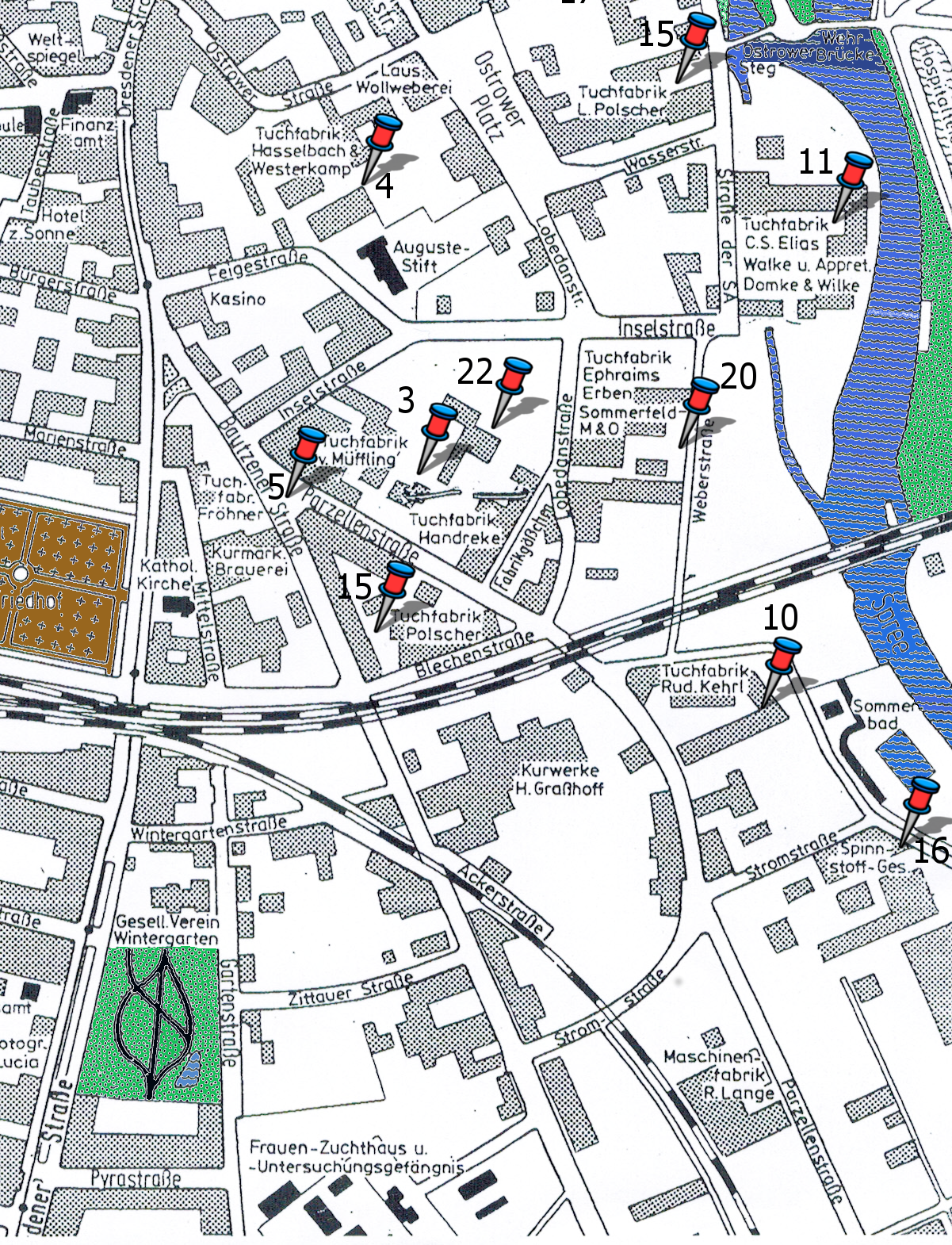 Stadtkarte 1938.1.4